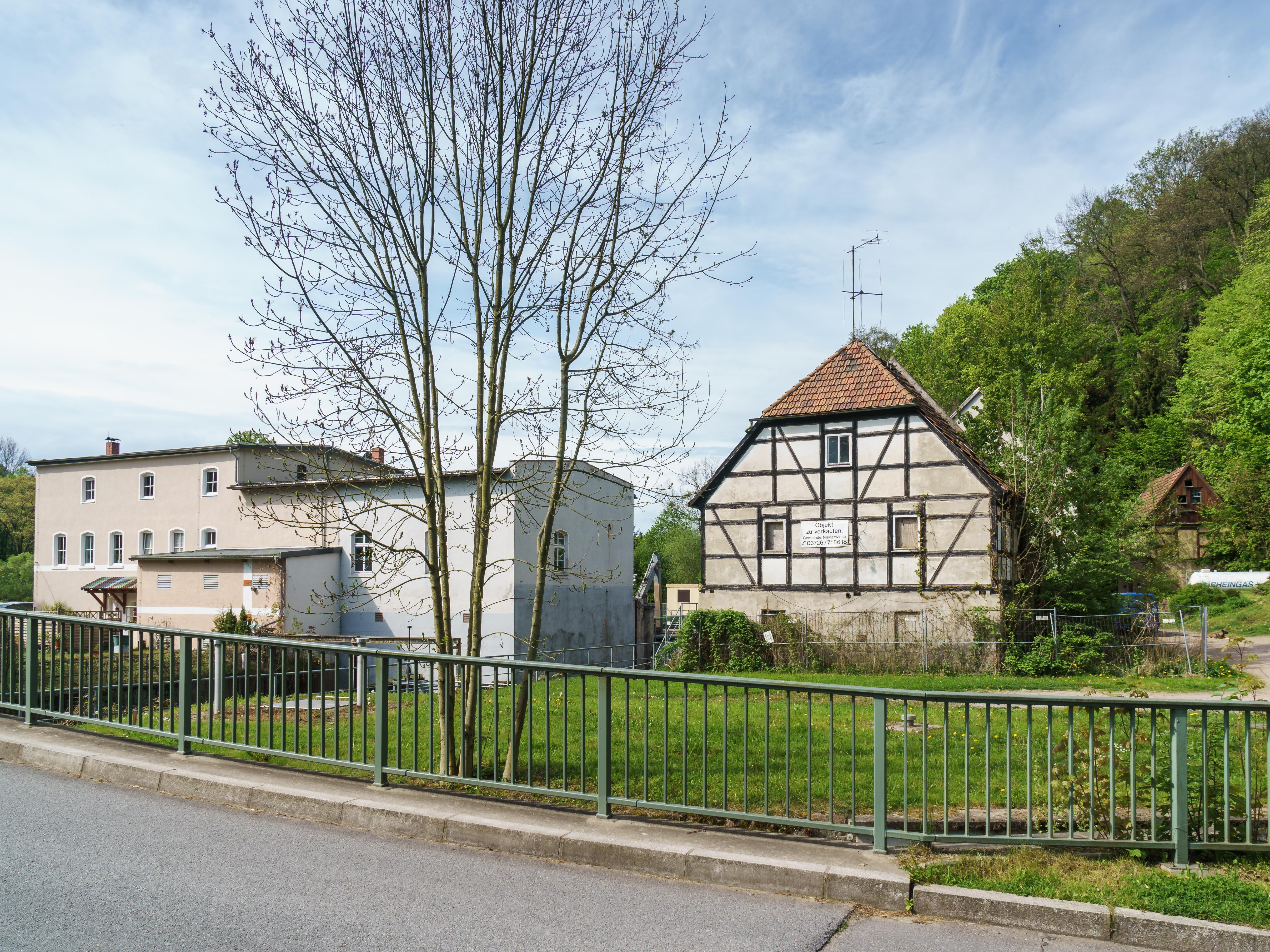 Schlossmühle Lichtenwalde, auch als Braunsdorfer Mühle, Lichtenwalder Mühle benannt an der Zschopau, Zur alten Mühle 4; 5 in Niederwiesa OT Lichtenwalde